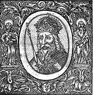 Zikmund Lucemburský